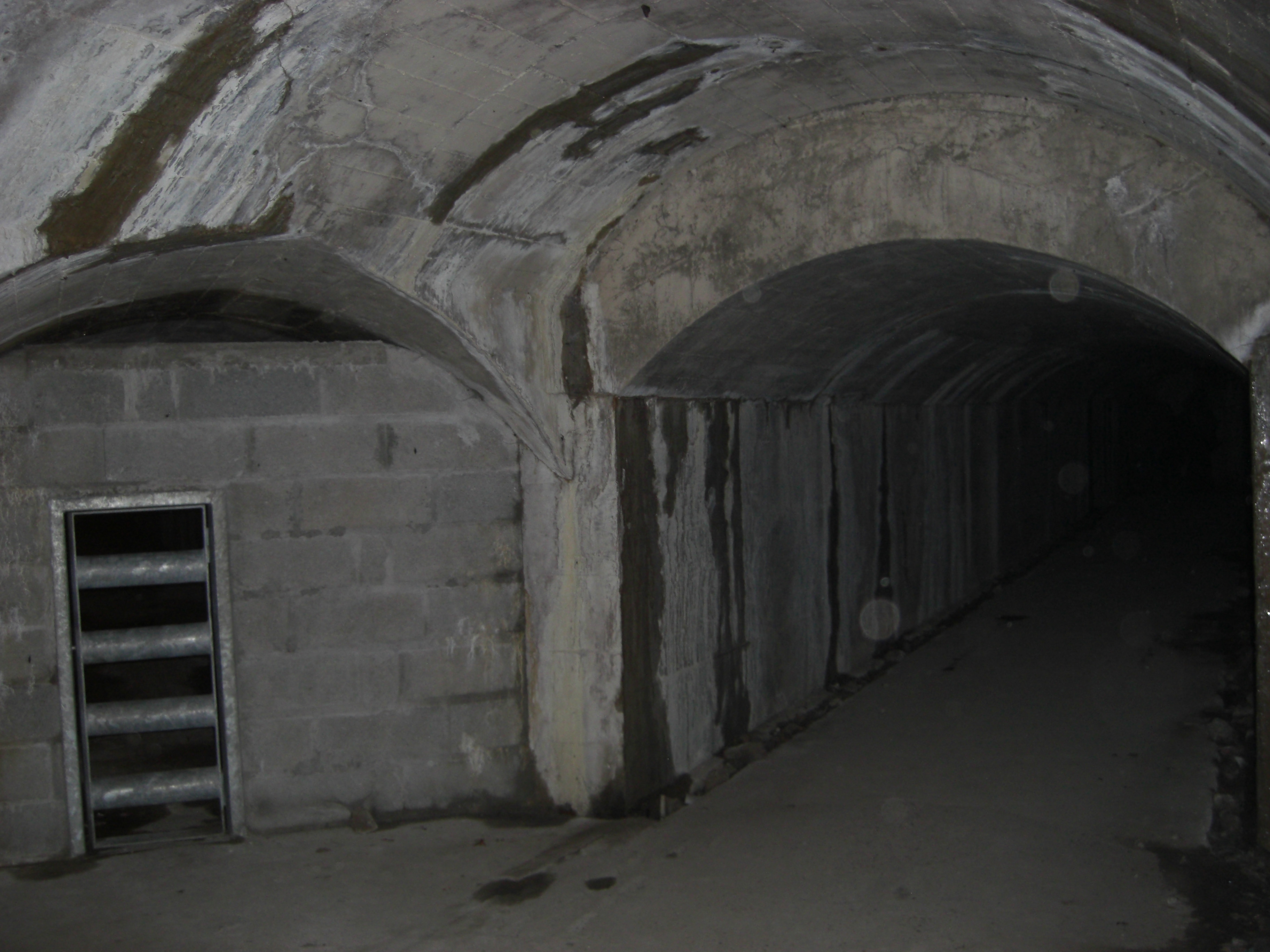 Réseau de Tunnel permettant d'accéder à la batterie allemande d'Auderville. Blockhaus seconde guerre mondiale.